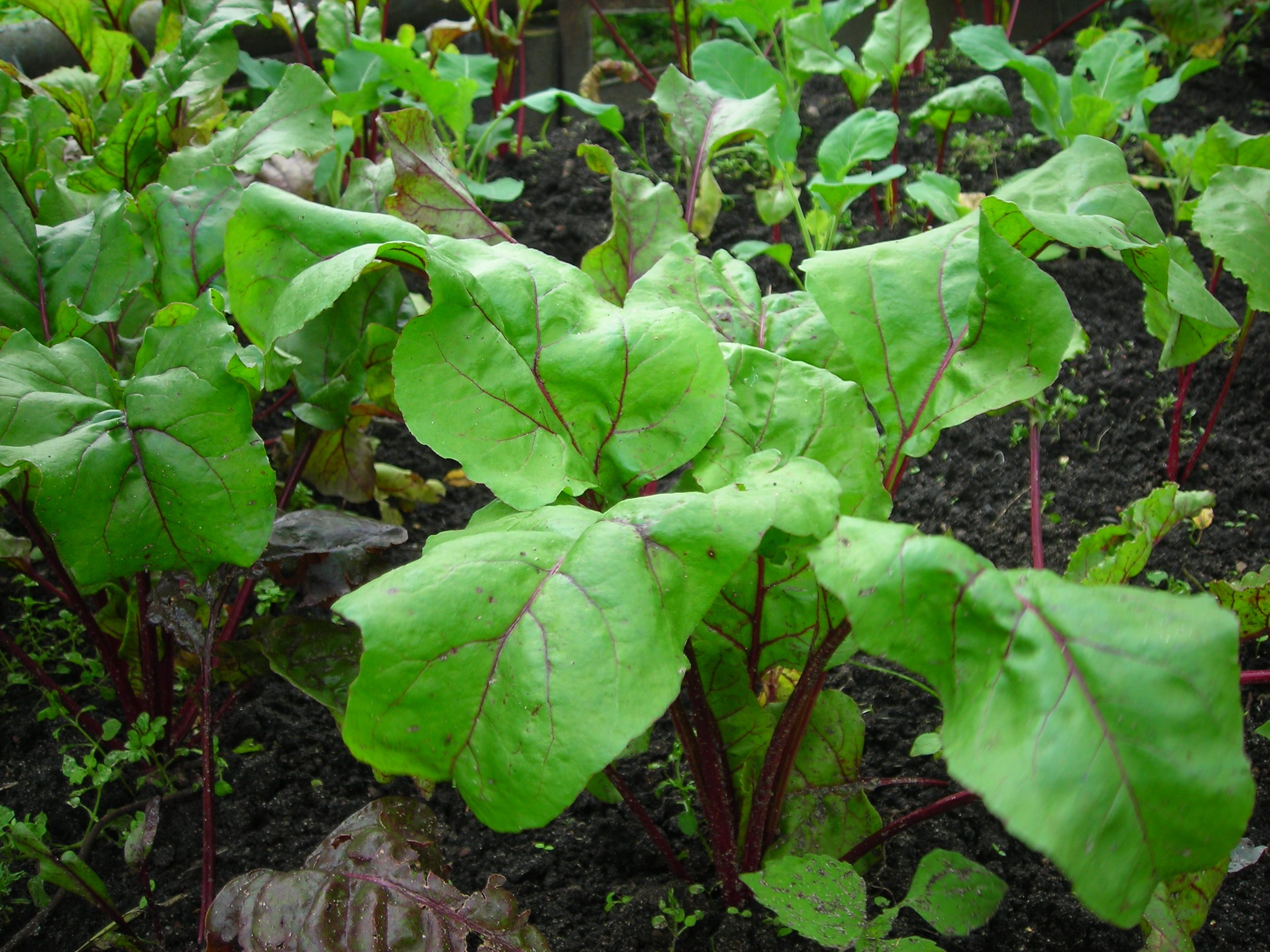 Свекольные листьяLatina: Beta vulgaris